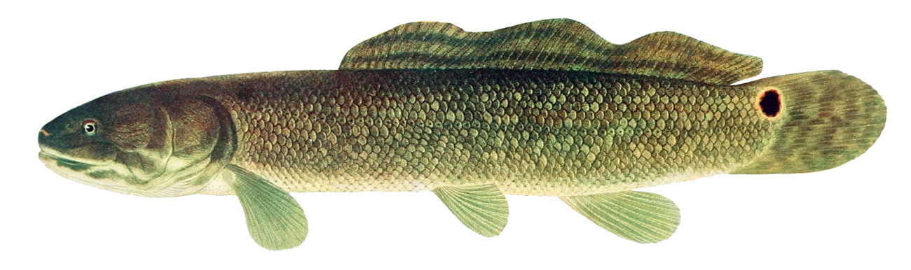 Amia calva